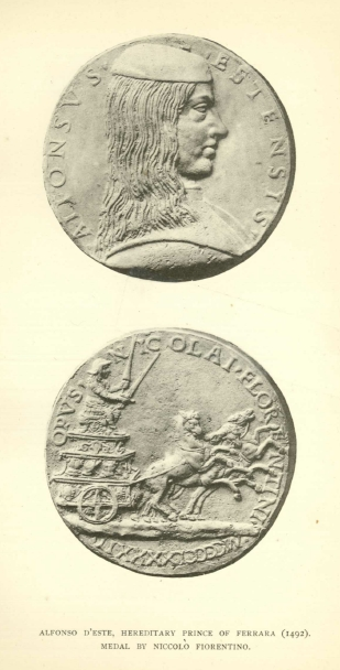 Alfonso I d'Este 1492 medal by Niccolo Fiorentino